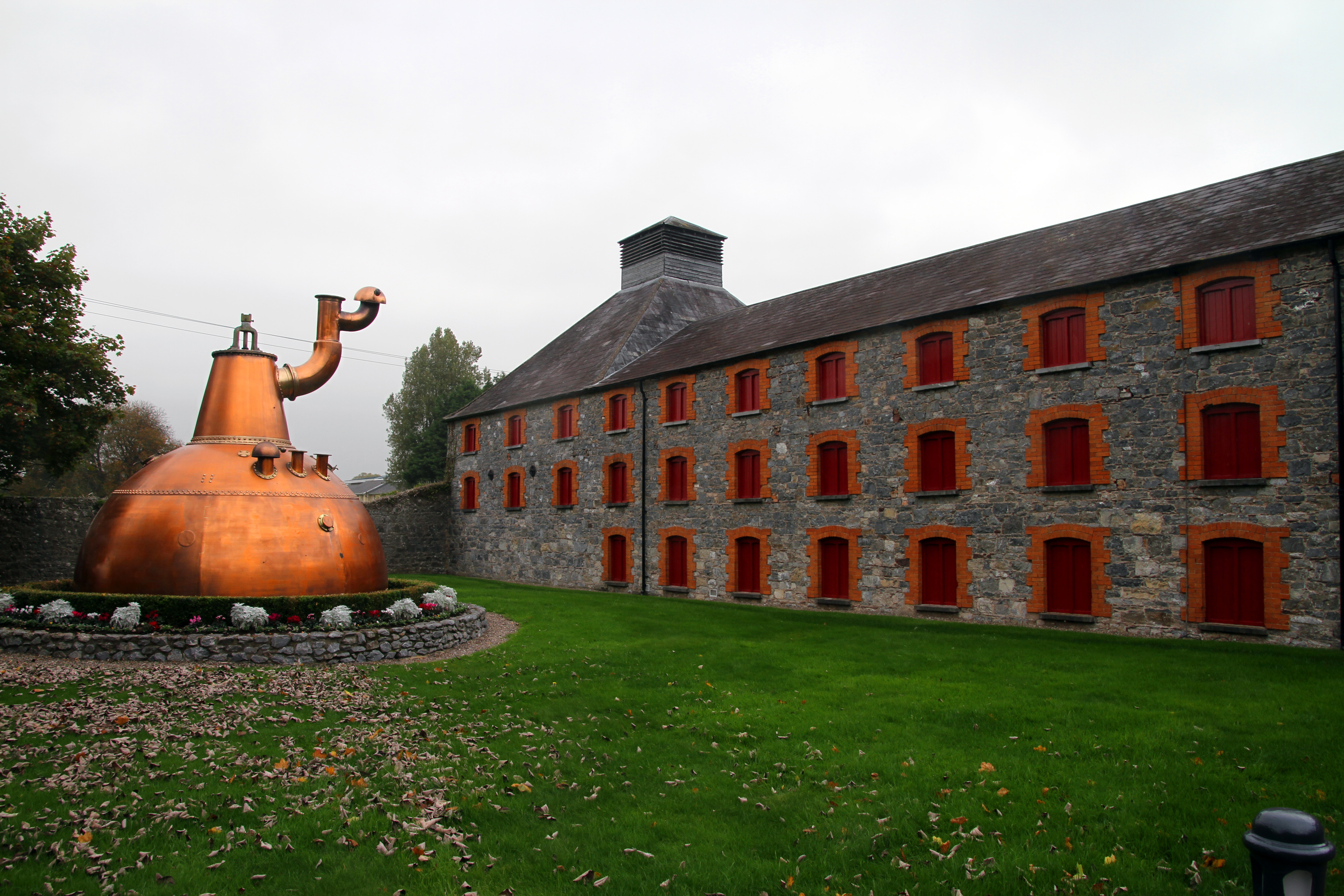 Jameson Whiskey Distillery in Midleton